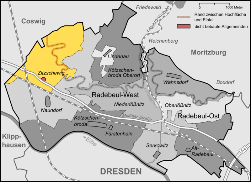 Karte der Stadtteile und Umlandgemeinden Radebeuls, hier Stadtteil Zitzschewig